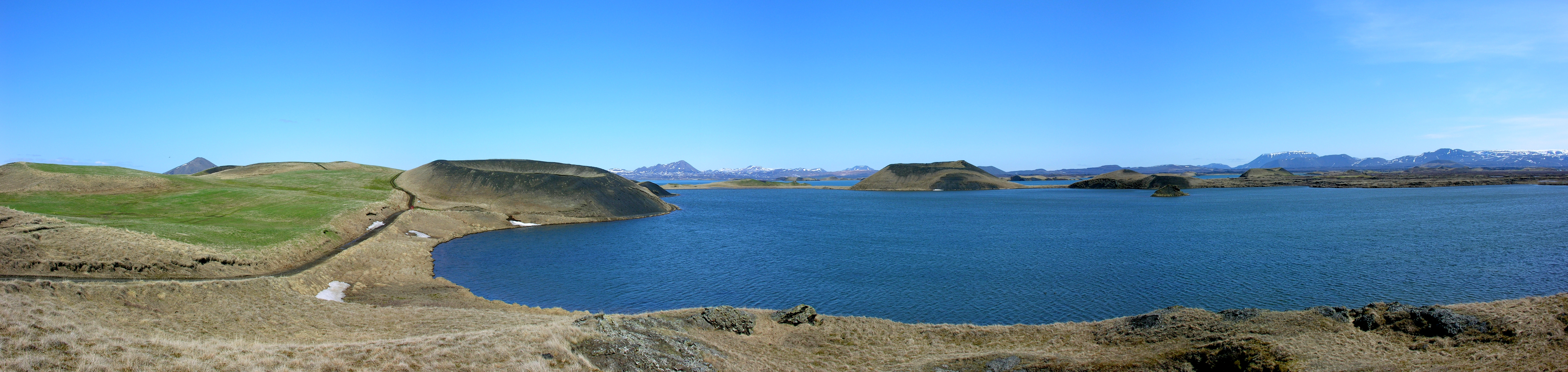 Pseudocraters near Skútustaðir